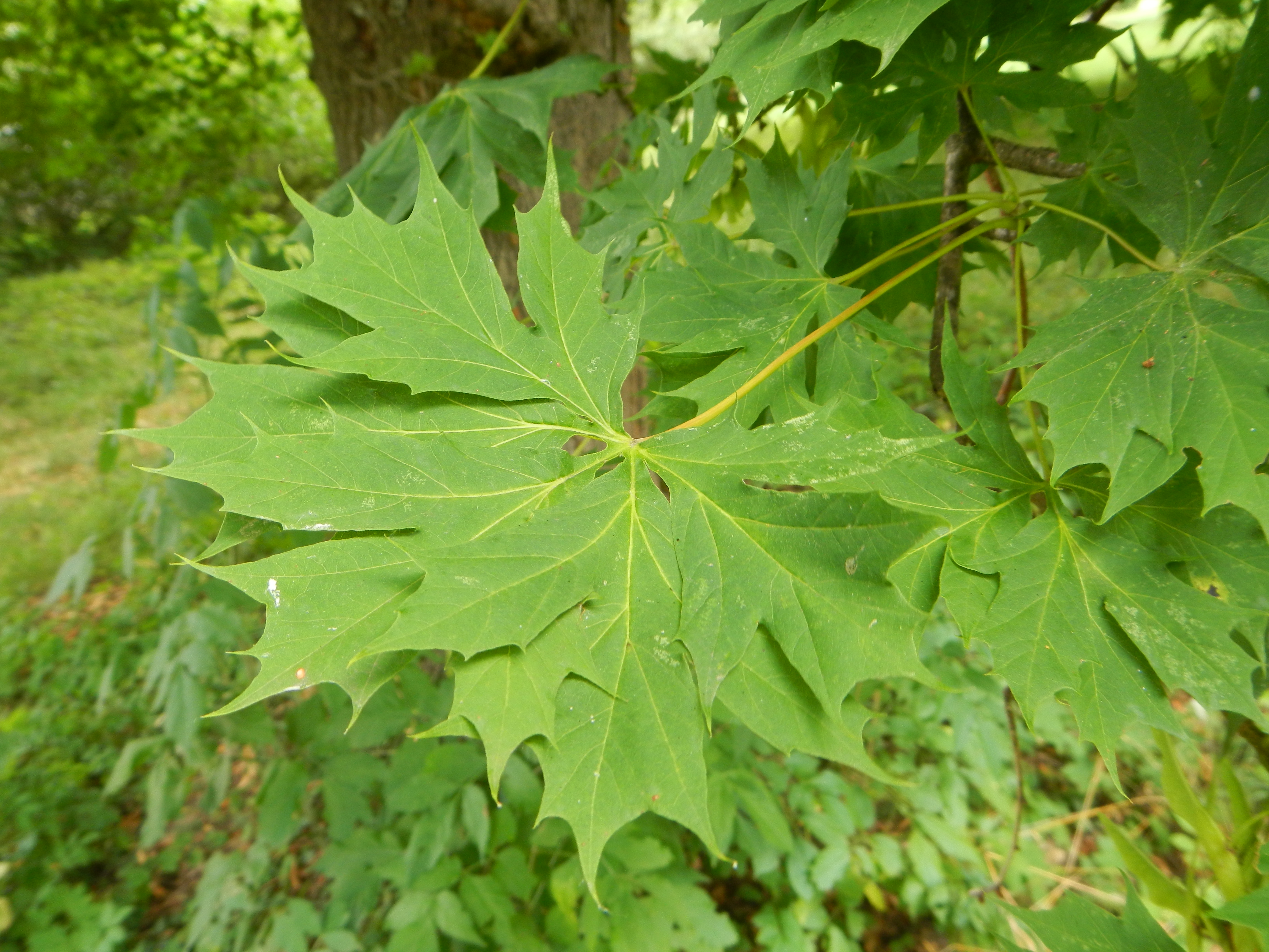 Acer platanoides 'Dissectum', park of Friedau (Lower Austria)